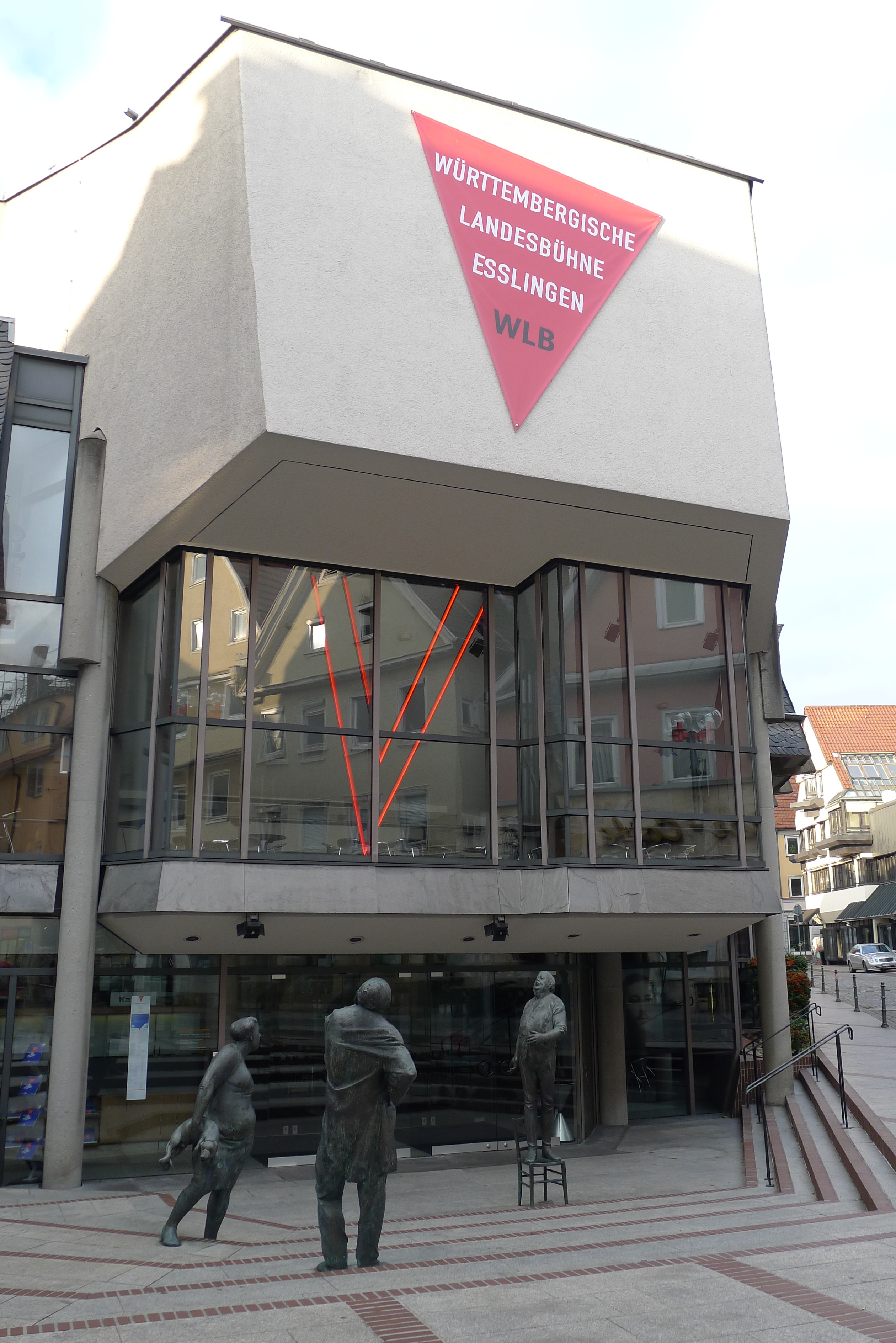 Ansicht des Schauspielhauses der Württembergischen Landesbühne Esslingen, Strohstraße 1, 73728 Esslingen